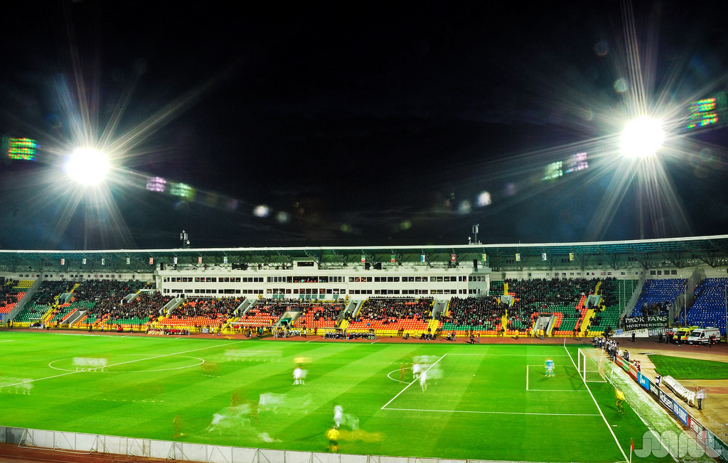 Estadio Central de Kazán durante un FC Rubin Kazan 2-2 PAOK FC (29.09.2011)